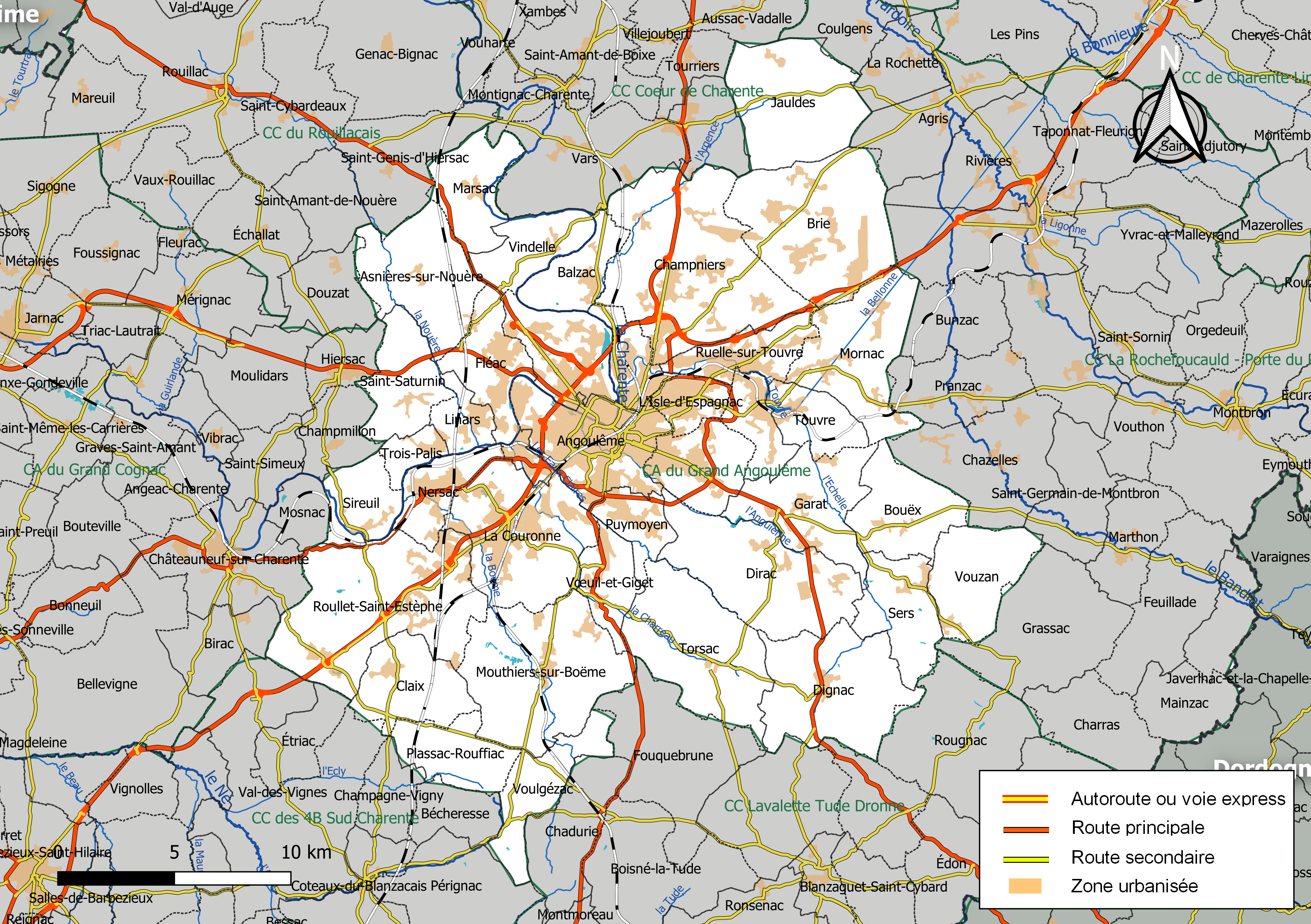 Carte géographique de la Communauté d'agglomération du Grand Angoulême, département de la Charente, France. Composition au 1er janvier 2019.